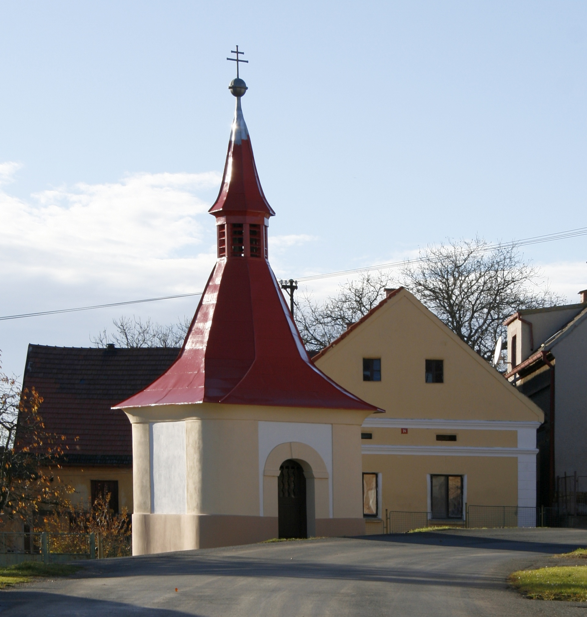 Kanice, okres Domažlice